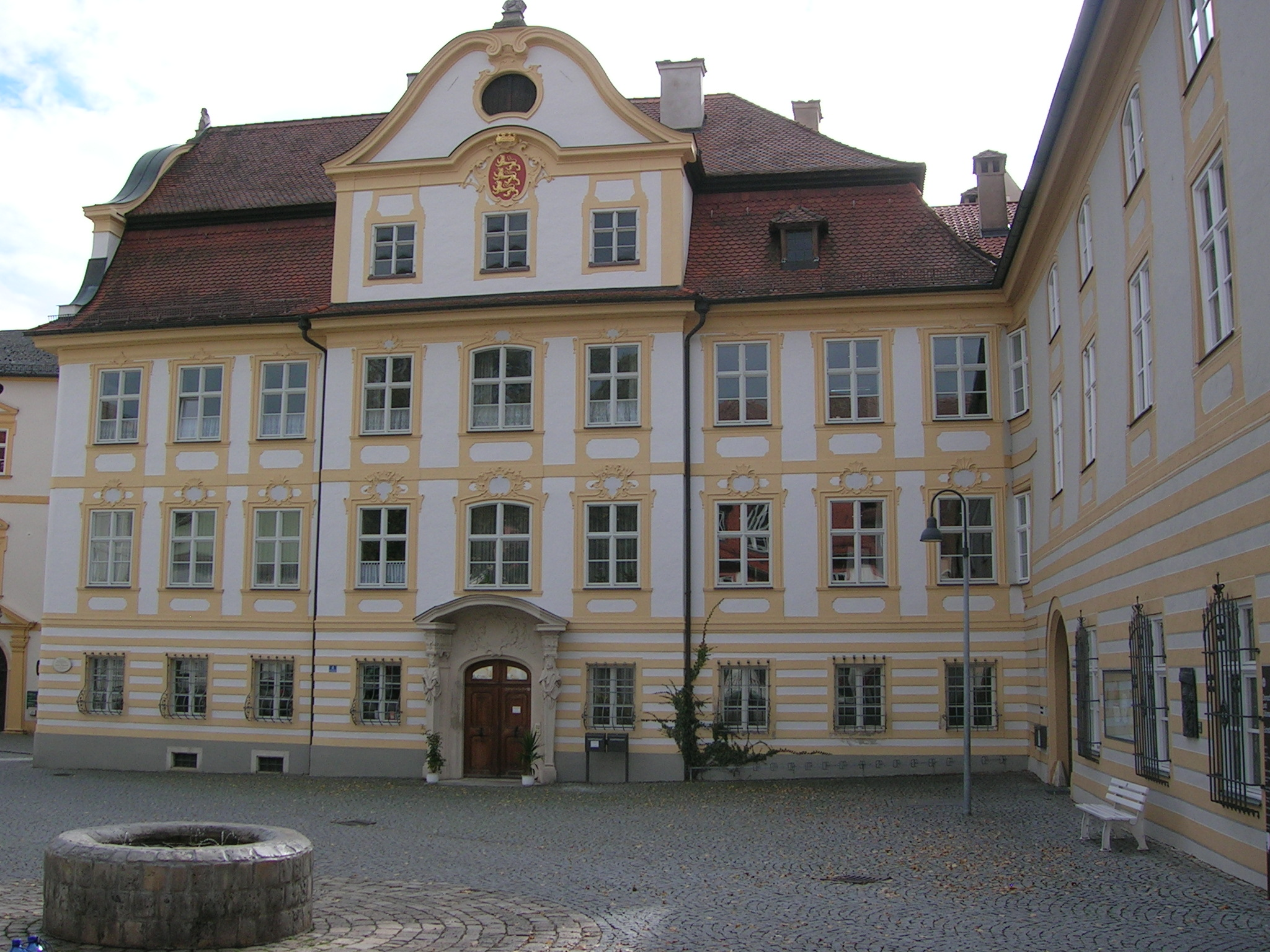 Südwestecke am Pater-Philipp-Jeningen-Platz in Eichstätt